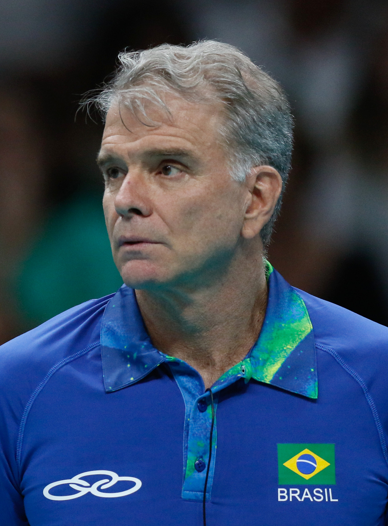 Rio de Janeiro - Seleção brasileira masculina de vôlei vence a da França por 3 sets a 1 no Maracanãzinho e vai às quartas-de-final (Fernando Frazão/Agência Brasil)